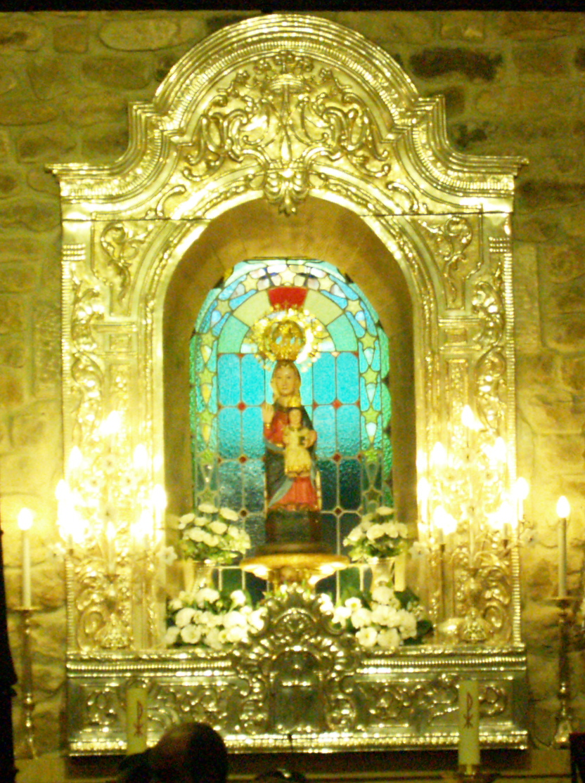 Gente saliendo de misa en el santuario de Nuestra Señora de Valvanuz